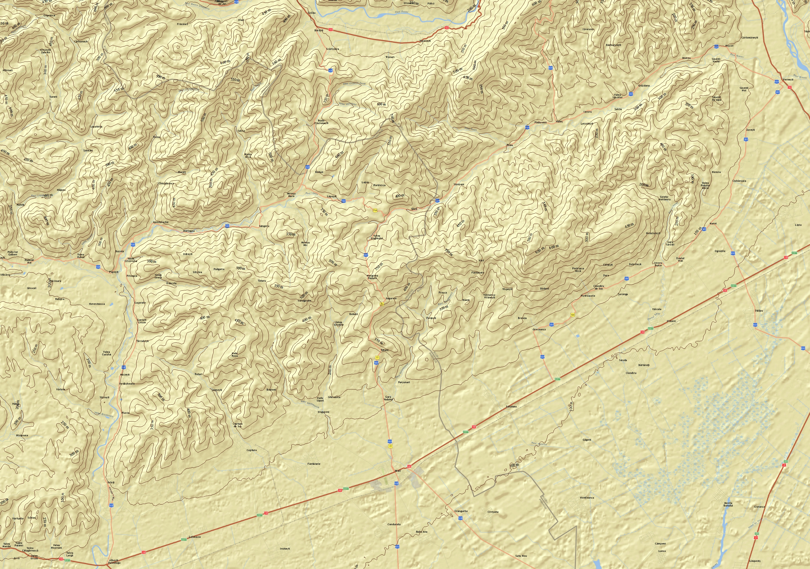 Hartă topografică a arealului dealulurilor Istriței - România (acestea în partea de sud la contactul cu câmpia sunt geomorfologic delimitate – în medie, de curba de nivel de 200 m. Curbele de nivel sunt la 50 m.)